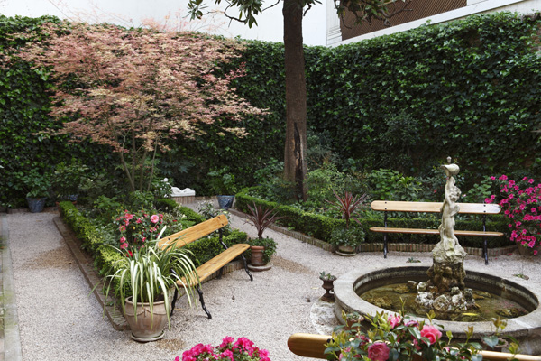 Vista del jardín del Museo del Romanticismo.